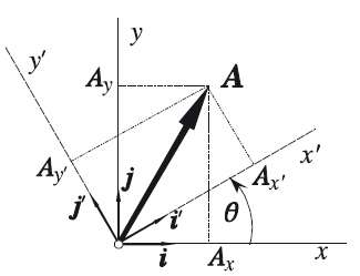 Rotación de un vector. Transformación lineal. Cambio de base.